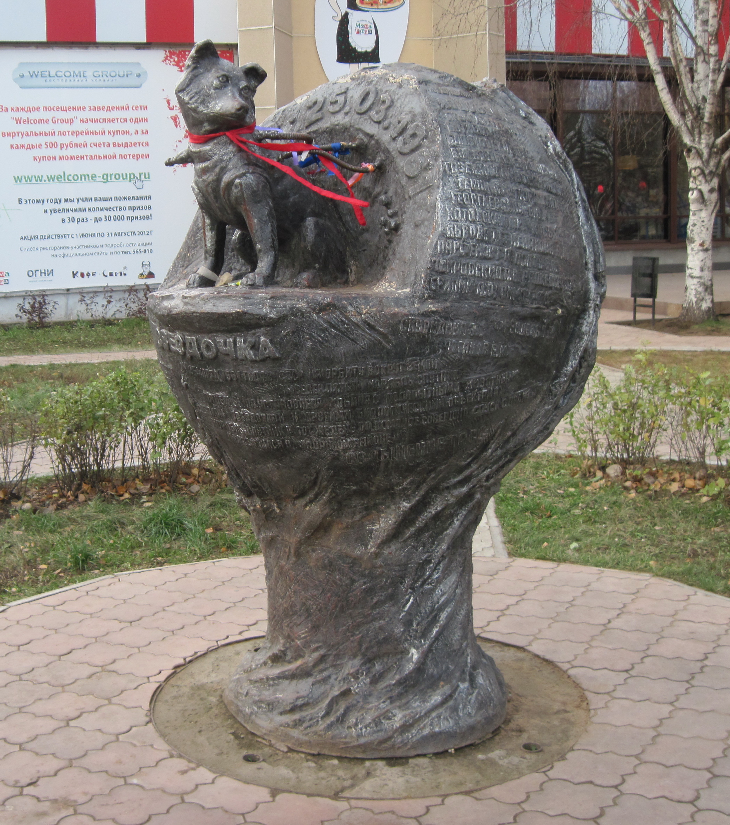 Памятник "Проложившим дорогу в космос" на ул. Молодёжная,в г.Ижевск